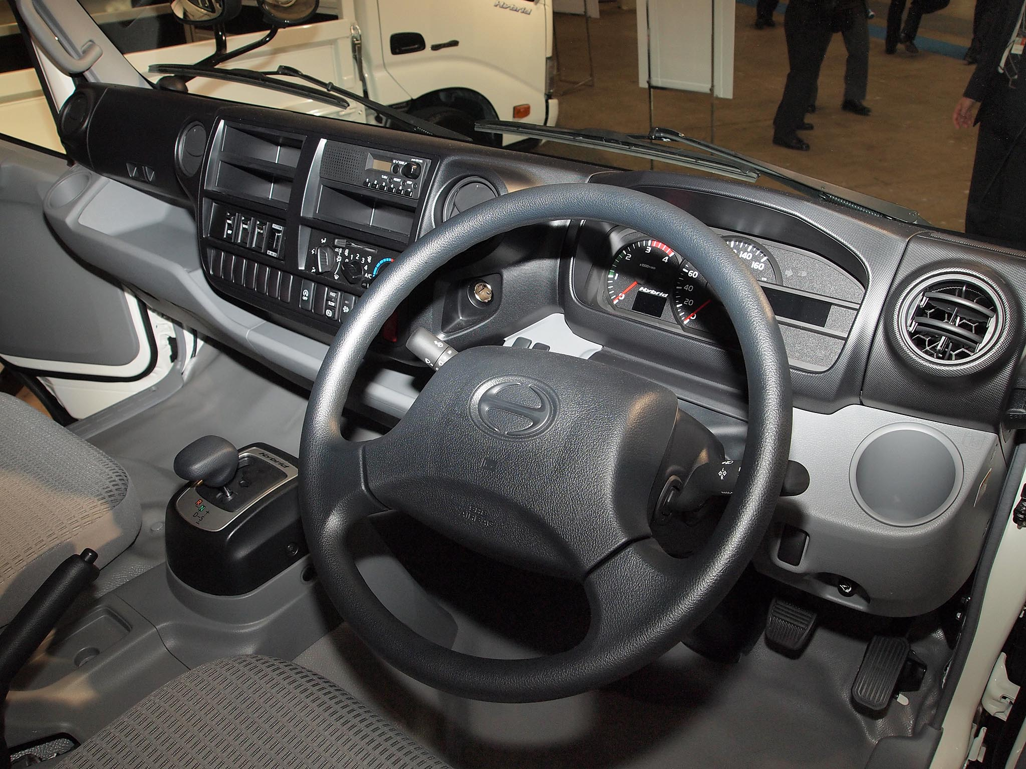 2代目日野デュトロハイブリッド（ワイドキャブ車）の運転席。 ハイブリッド車のトランスミッションはプロシフトVを採用。 燃料残量計と水温計、シフトインジケーターがマルチインフォメーションモニターに表示される。 センターコンソールはエアコンパネルを含めて標準キャブが4DIN分（上2、下1+1）、ワイドキャブ車は6DIN分（上2+2、下1+1）確保される。